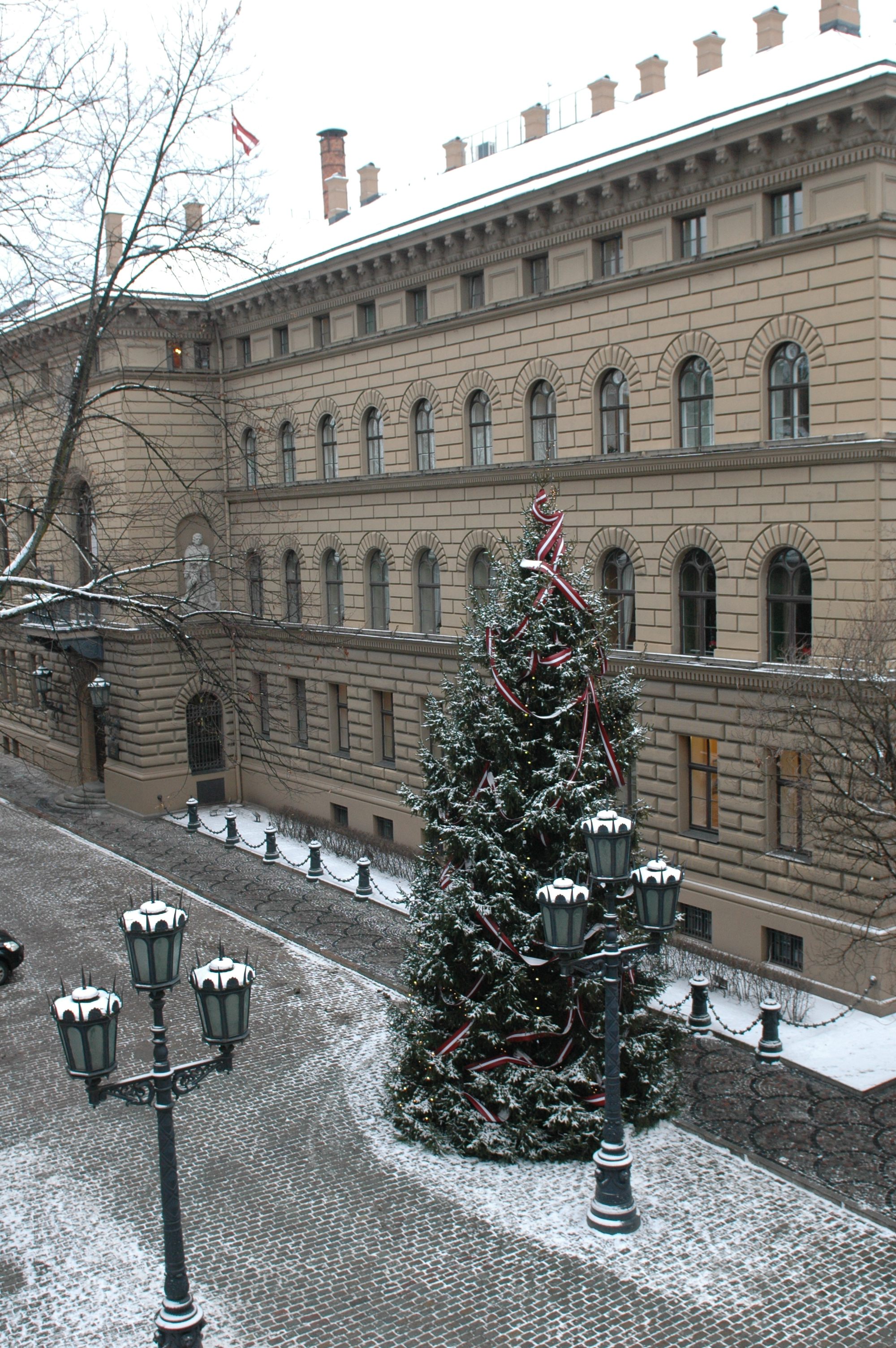 Ceturtdien, 2.decembrī, pie Saeimas nama iedegta Ziemassvētku eglīte. Foto: Uldis Pāže, Saeimas Kanceleja